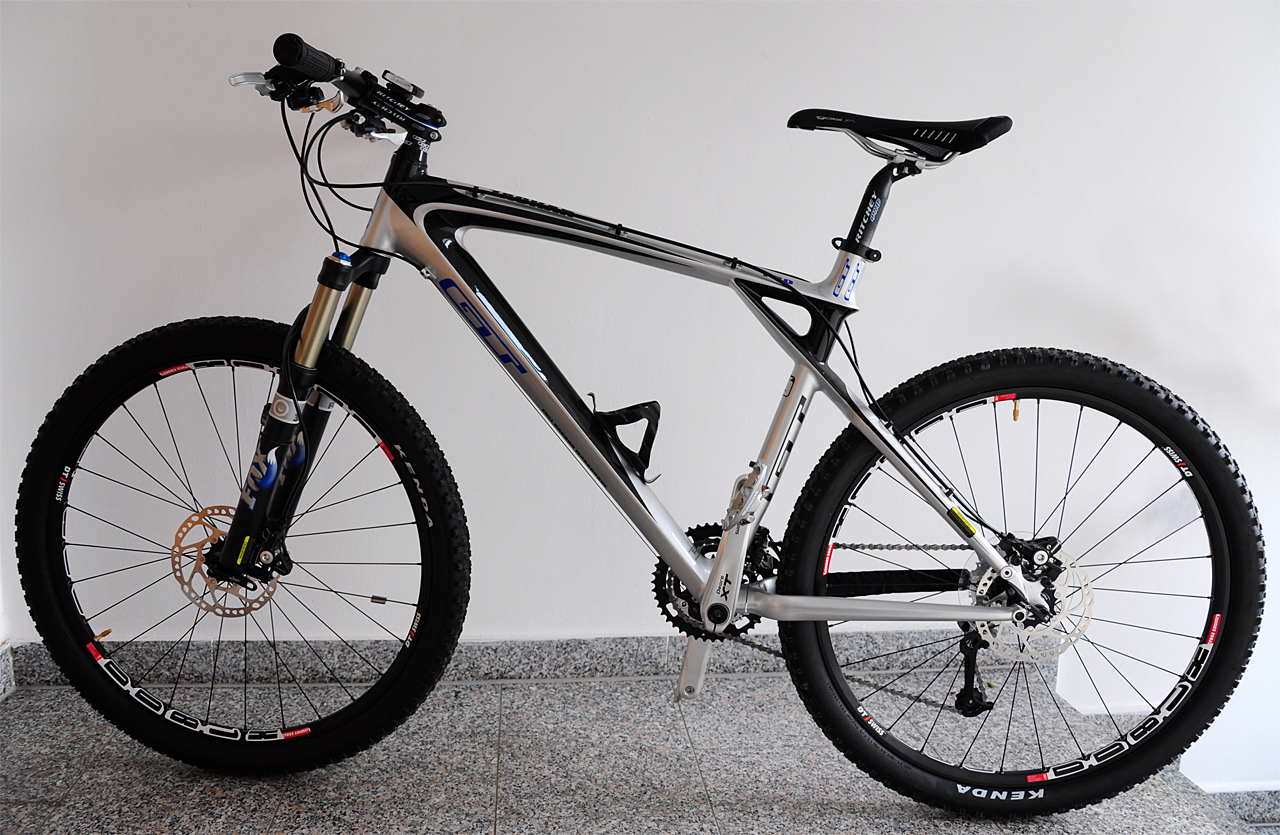 GT Zaskar Pro Carbon, Modell 2008